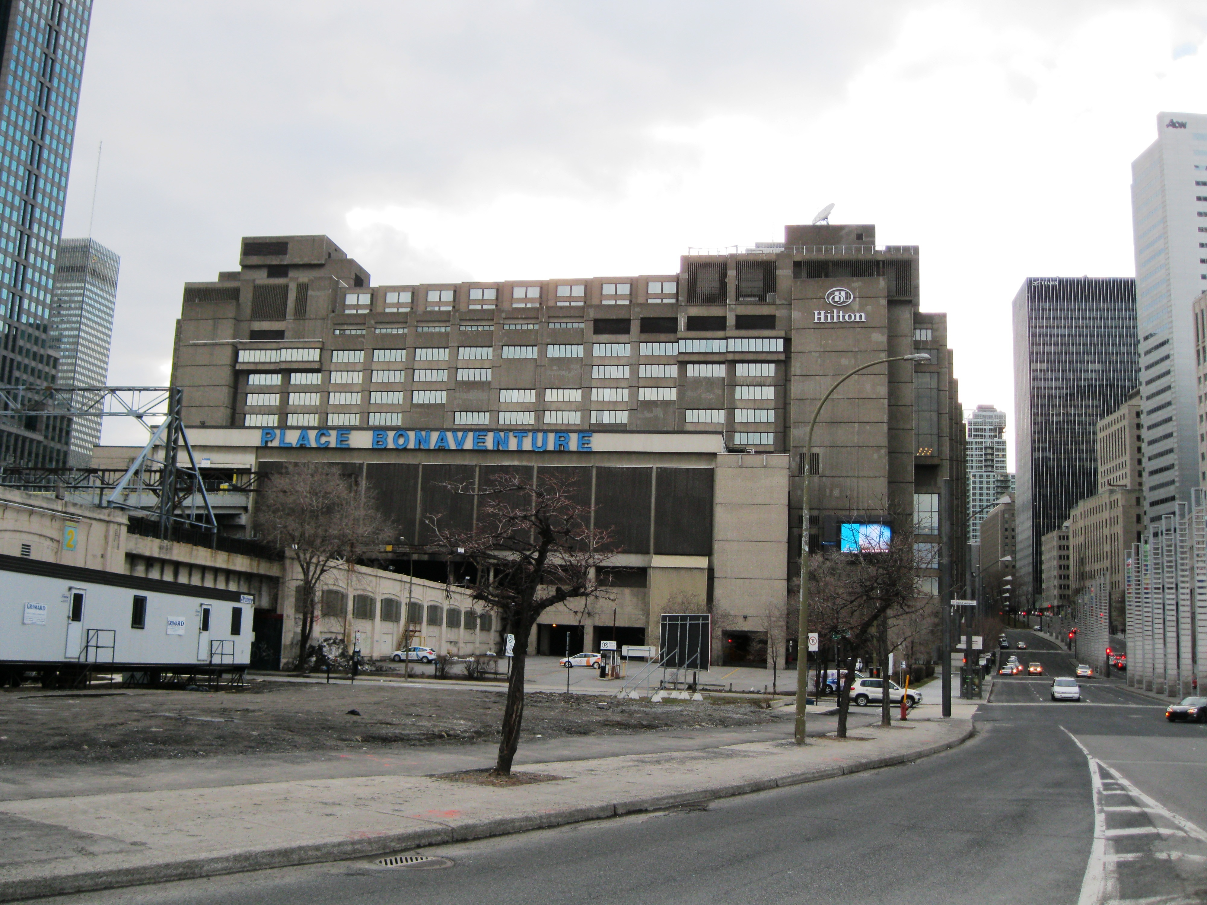 Place Bonaventure, côté sud, vue de la rue University, Montréal